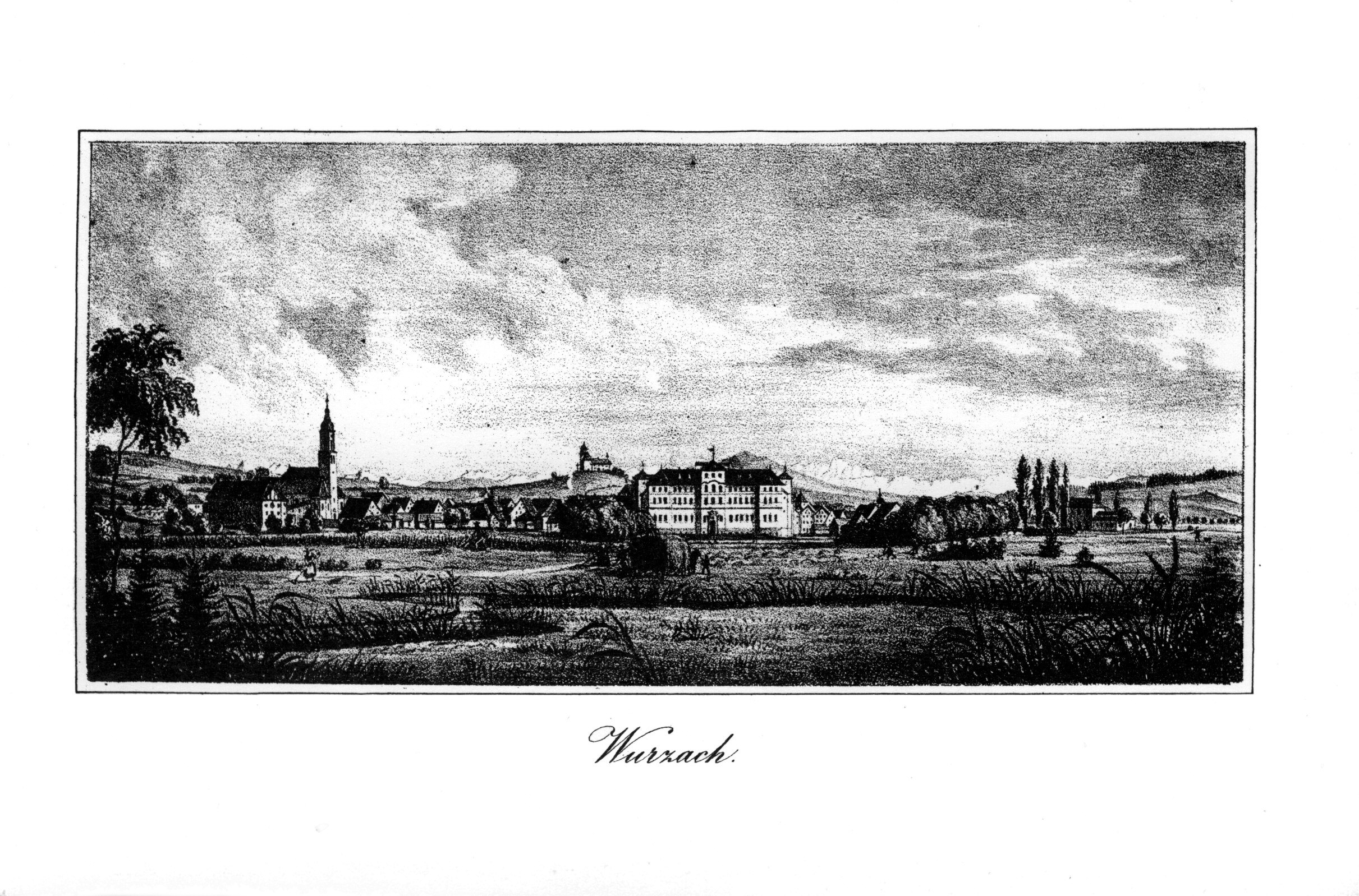 Ansicht von Wurzach (heute Bad Wurzach), Frontispiz von: Beschreibung des Oberamts Leutkirch Scan um 90° gedreht